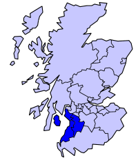 Ayrshire and Arran in Schotland (eerder gepubliceerd, opnieuw upgeload)